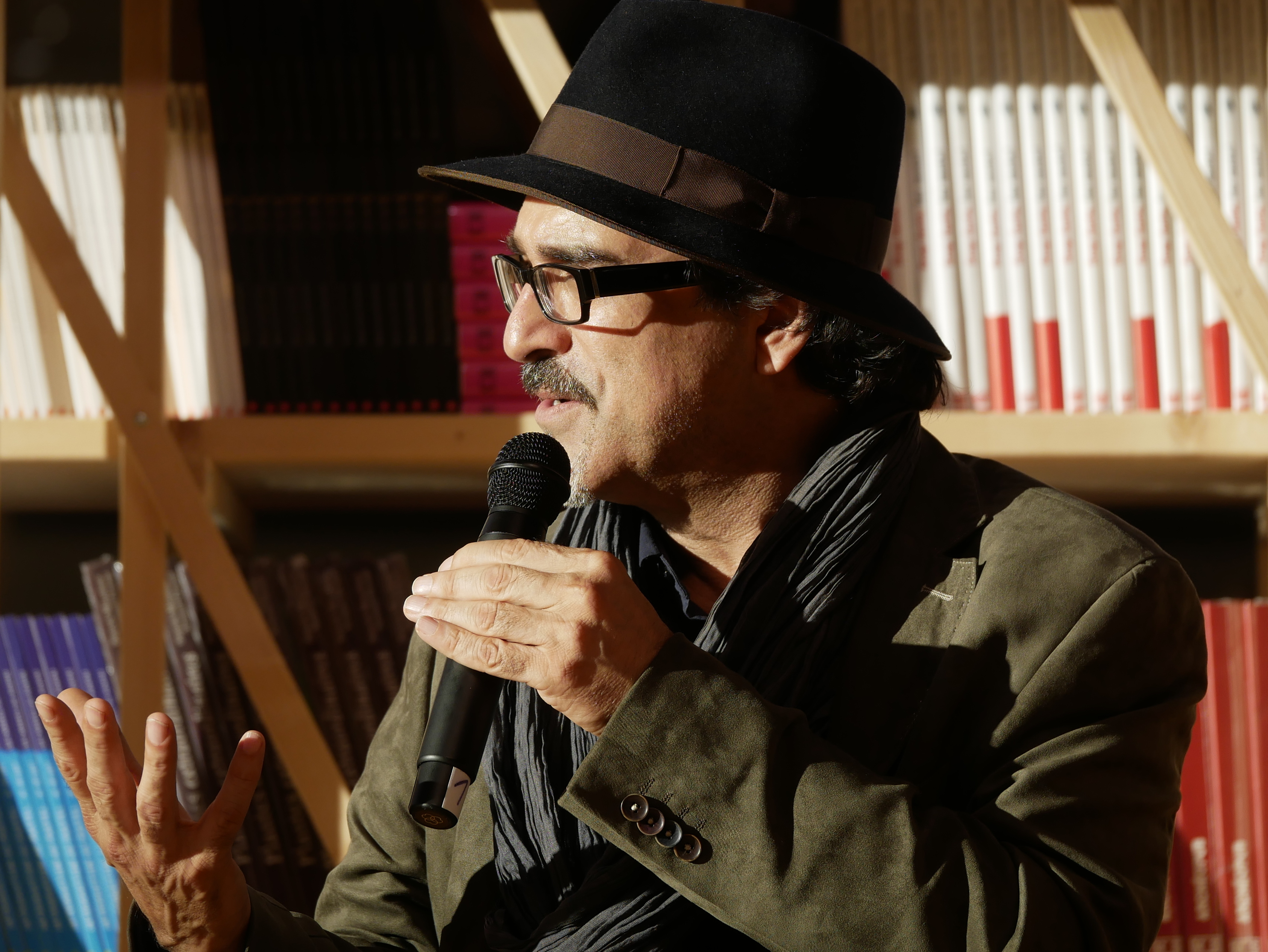 Frankfurter Buchmesse 2017 - Atiq Rahimi in der Sendung Masterclasse moderiert von Delphine Chaume.